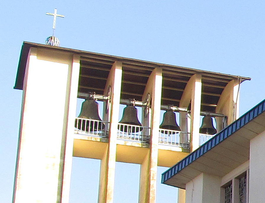 Glocken, Katholische Pfarrkirche St. Barbara, Am Hang, Saarbrücken, Dudweiler